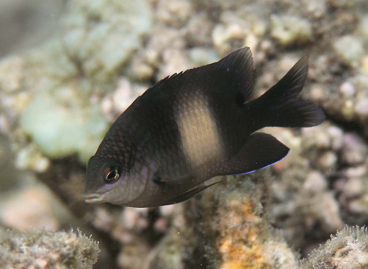 Un grégoire noir (Stegastes nigricans) à la Réunion.